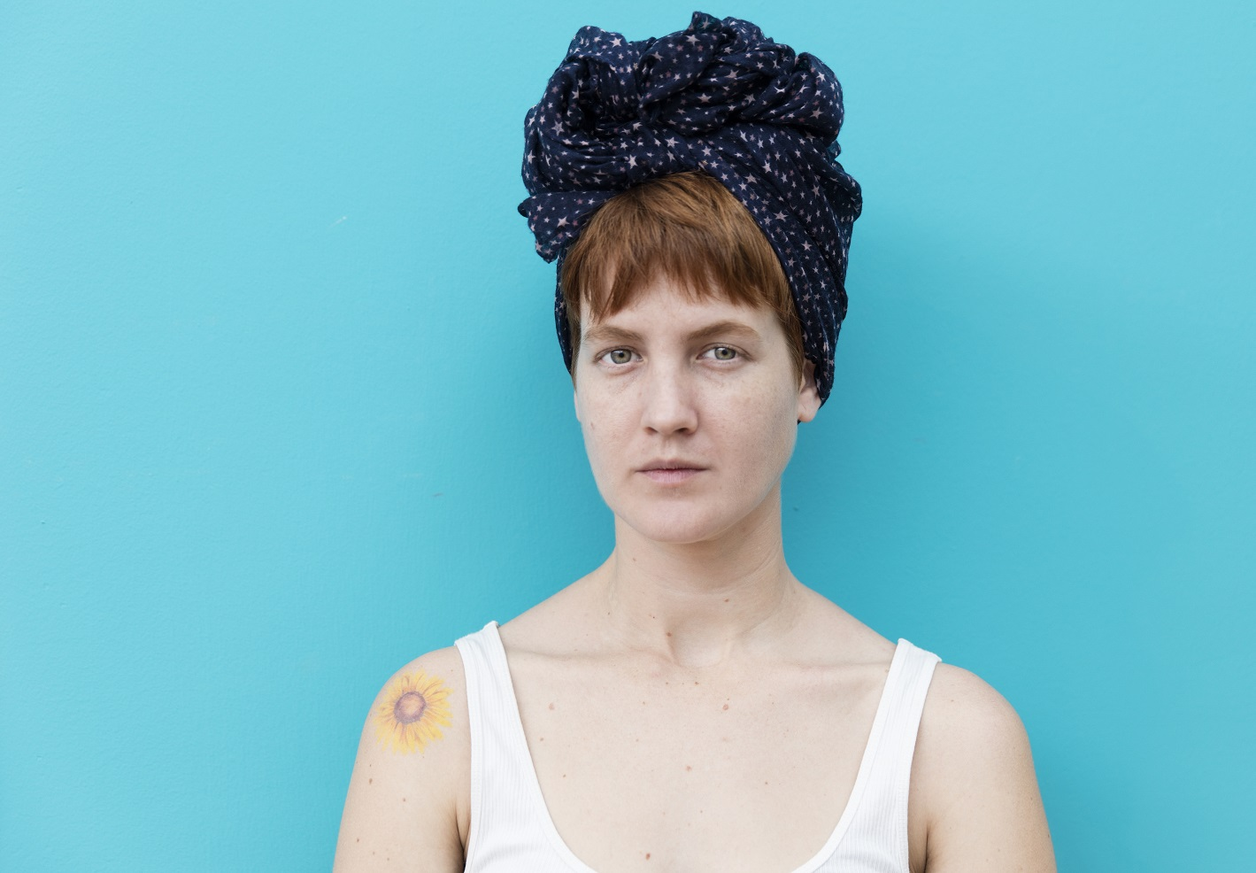 Fotografa, actriz y modelo cubana May Reguera